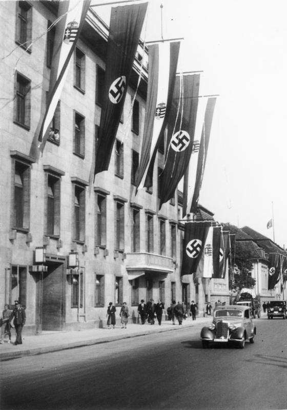 Berlin, Reichskanzlei Die Reichskanzlei schmückt sich für ihren hohen Gast. Scherl-Bilderdienst, Berlin 23.8.38 [Zum Besuch des ungarischen Reichsverwesers Nikolaus von Horthy]